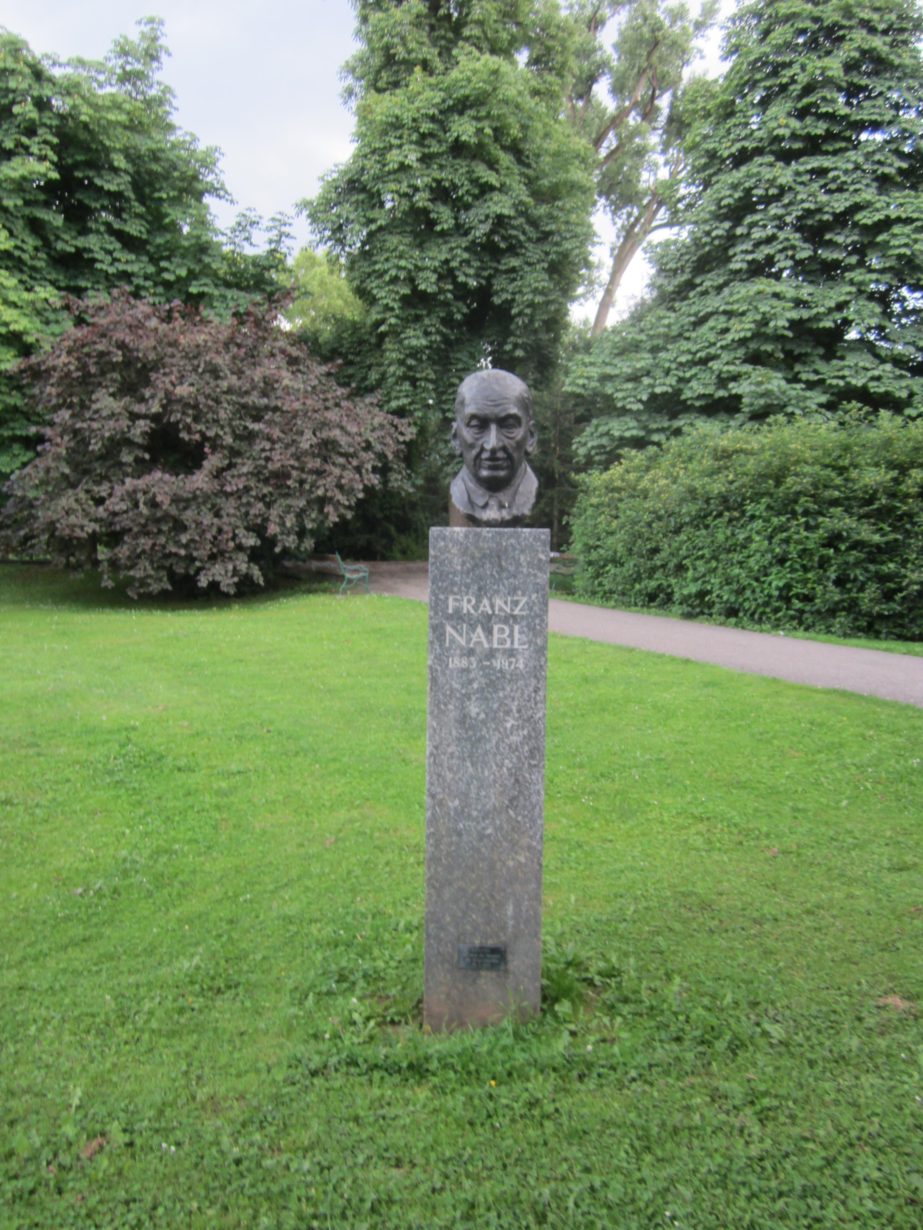 Büste von Franz Nabl im Stadtpark Graz